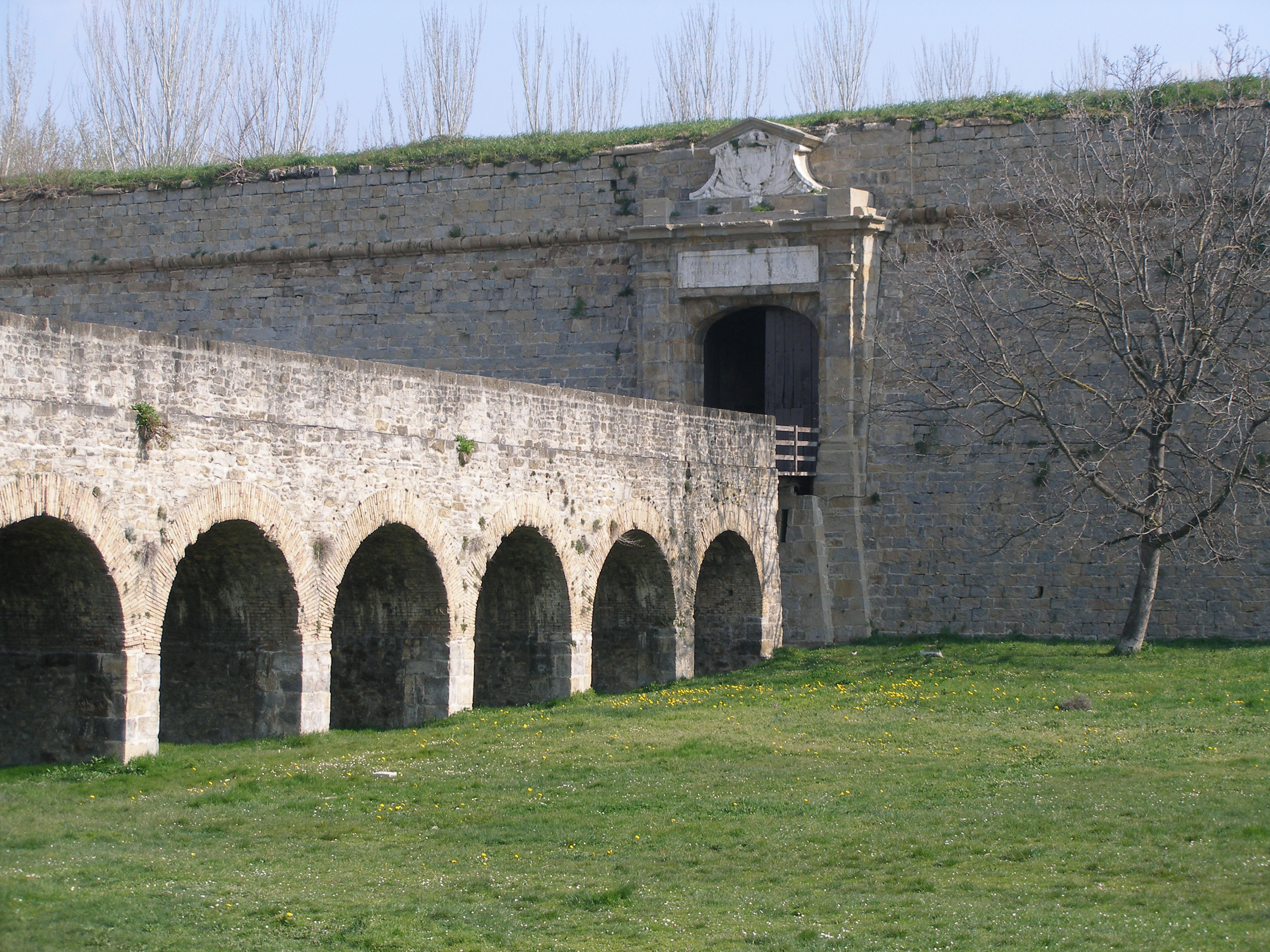 Ciudadela de Pamplona (España)